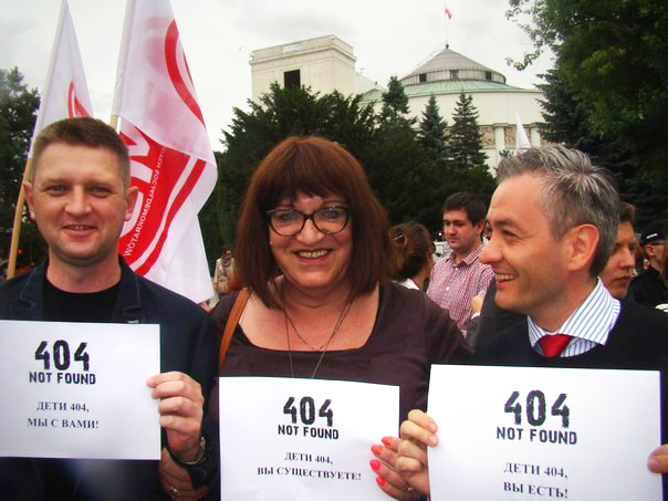 Депутаты Сейма Польши Анджей Розенек, Анна Гродская и Роберт Бедронь. Акция в поддержку российского проекта «Дети-404. ЛГБТ-подростки. МЫ ЕСТЬ!»